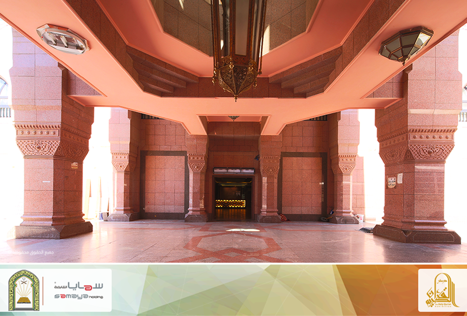 ضصورة من المدخل للمعر